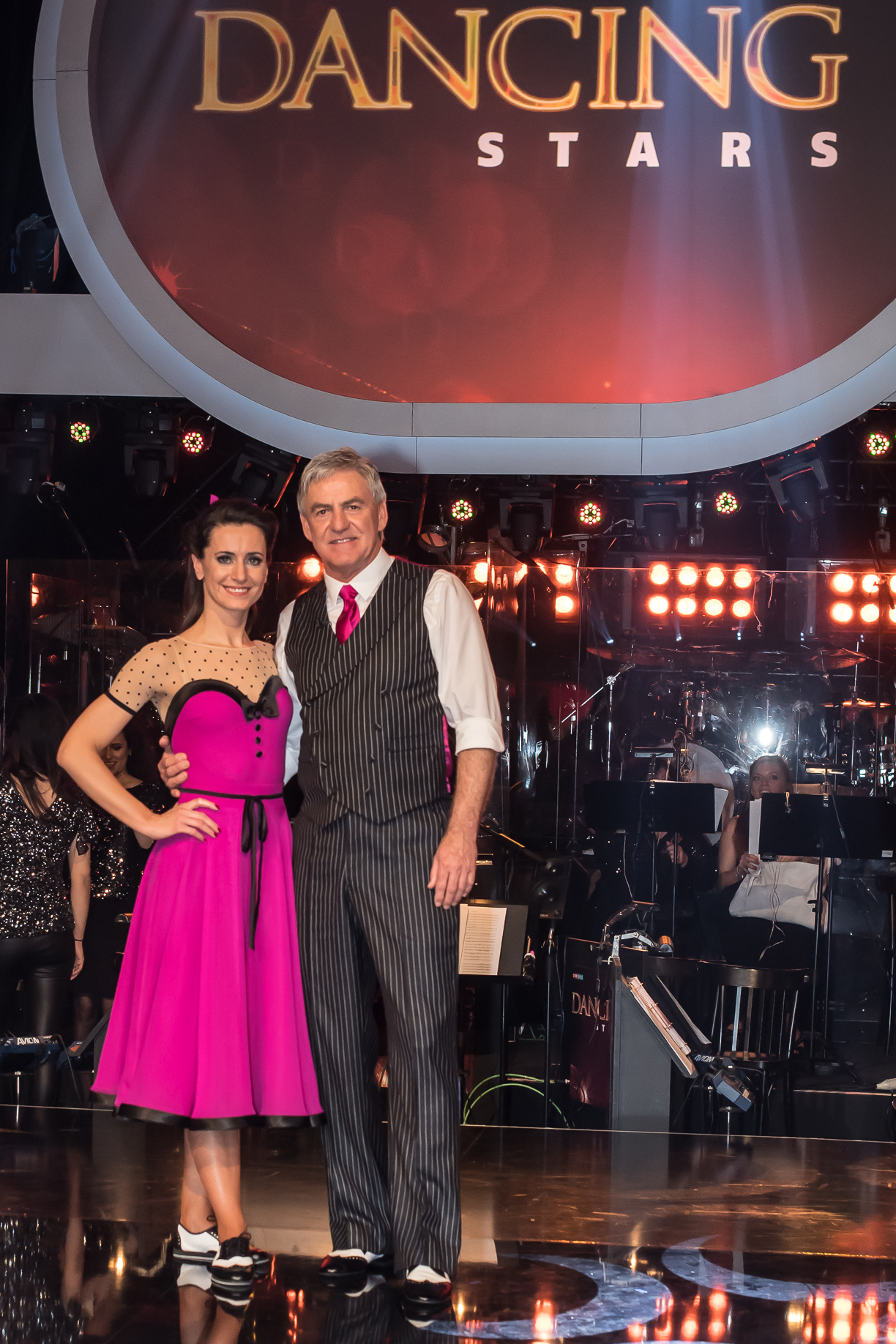 ORF Dancing Star am 5.5.2017 im ORF-Zentrum Wien. Bild zeigt Lenka Pohoralek und Walter Schachner.